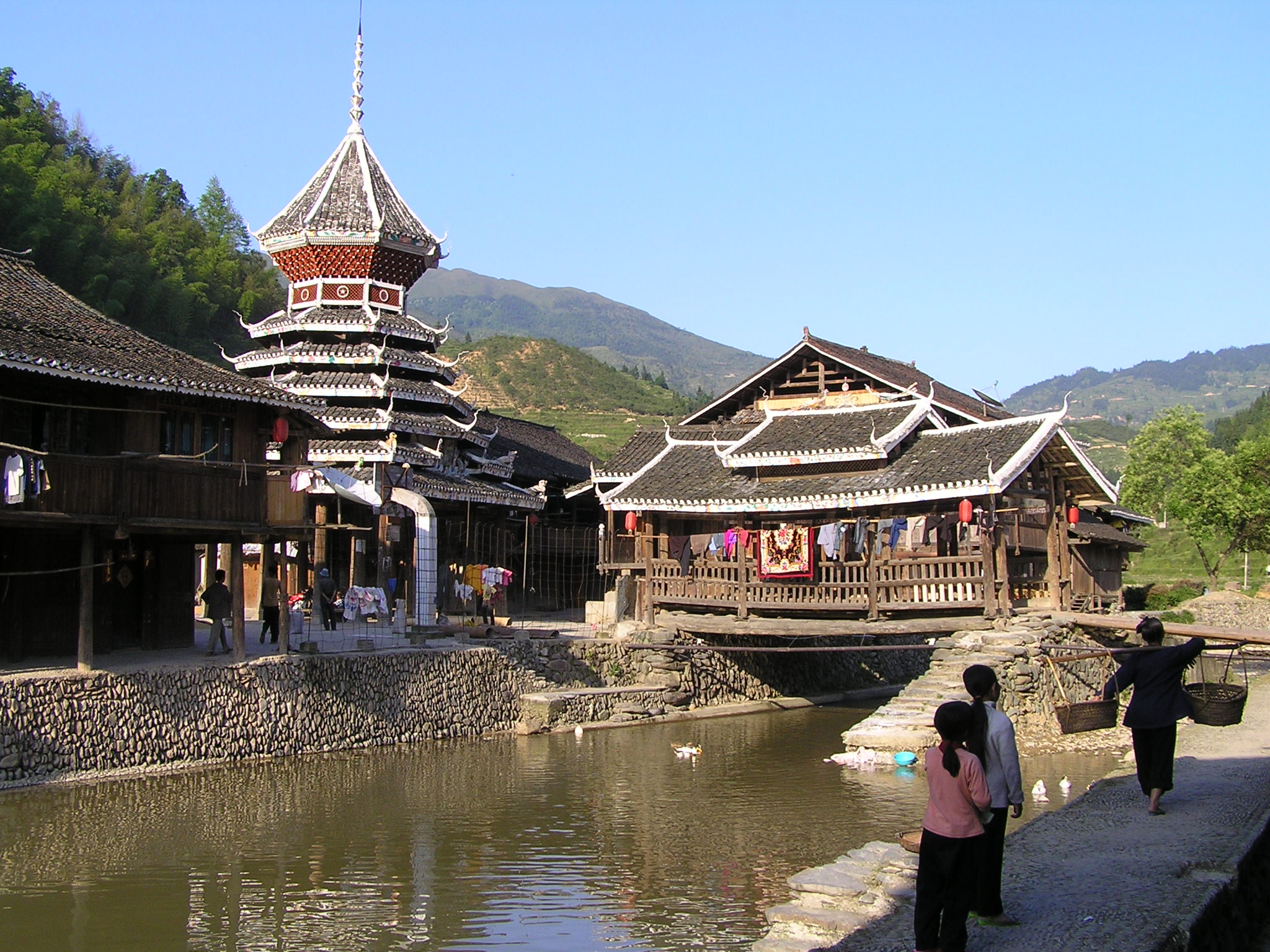 Zhaoxing